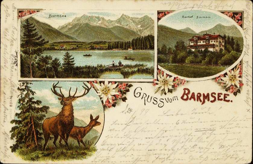 Barmsee bei Garmisch Bayern um 1899